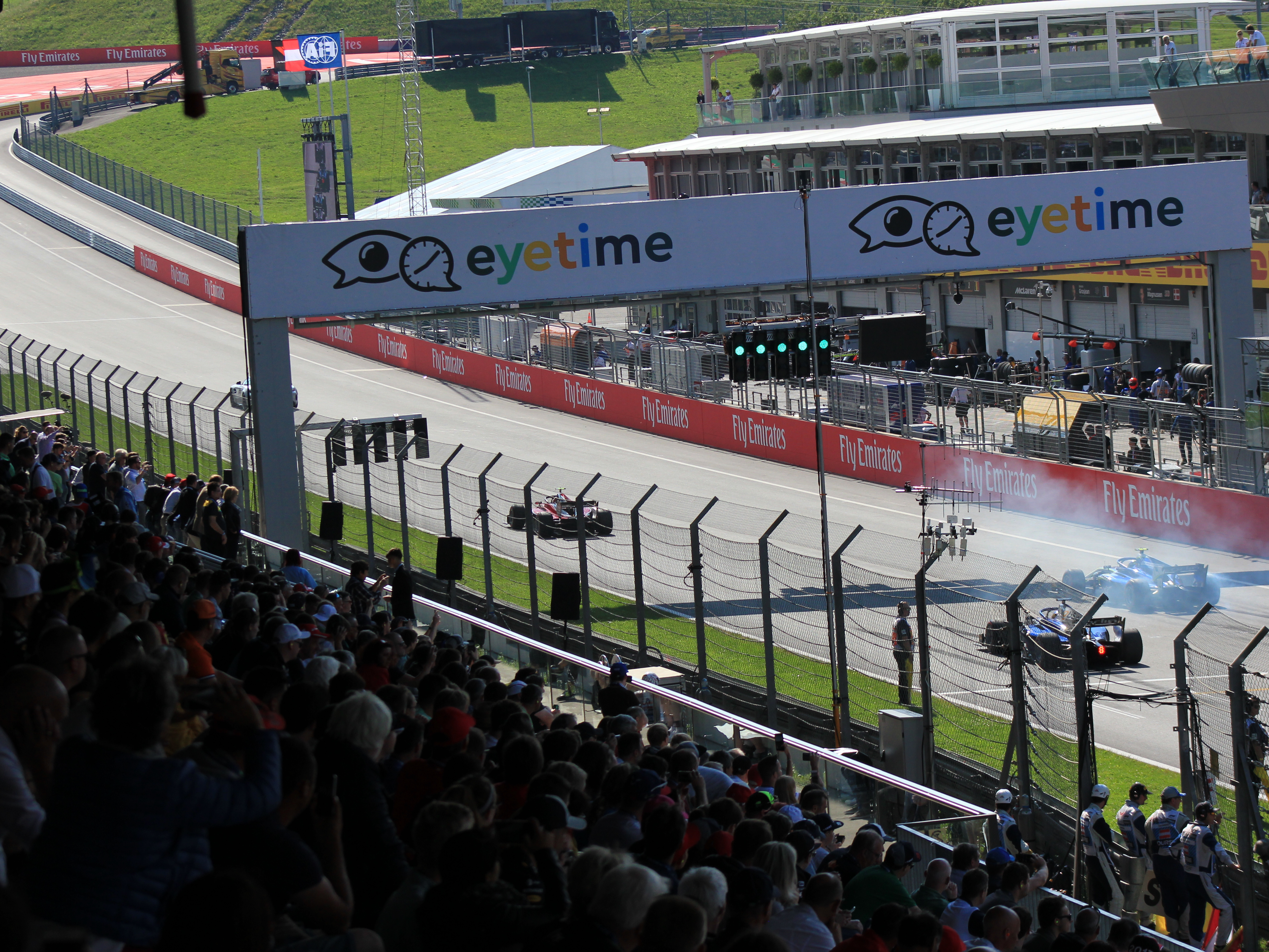 Start zur Einführungsrunde